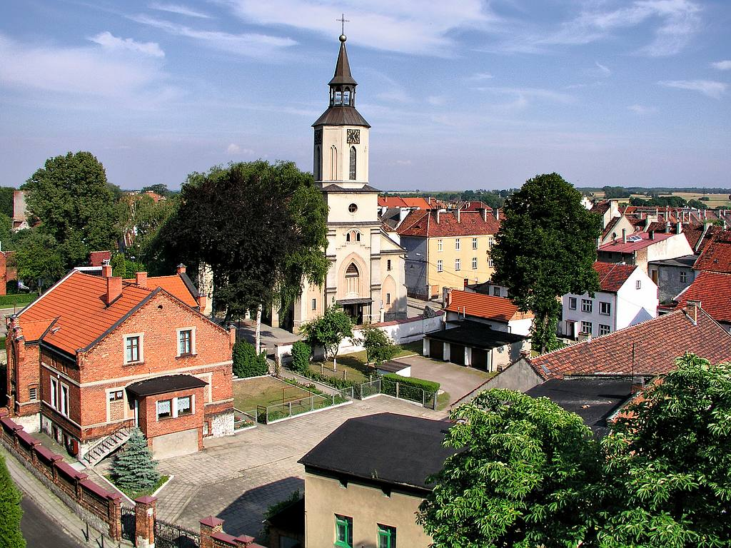 Kościół parafialny pw. św. Mikołaja Pyskowice, Pyskowice 03.1960.